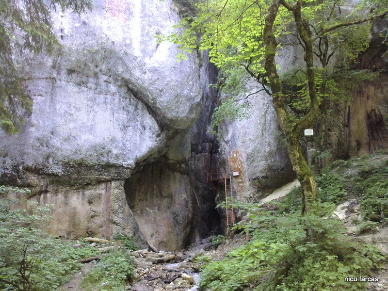 Canionul Şapte scări, Masivul Piatra Mare, Munţii Baiului.